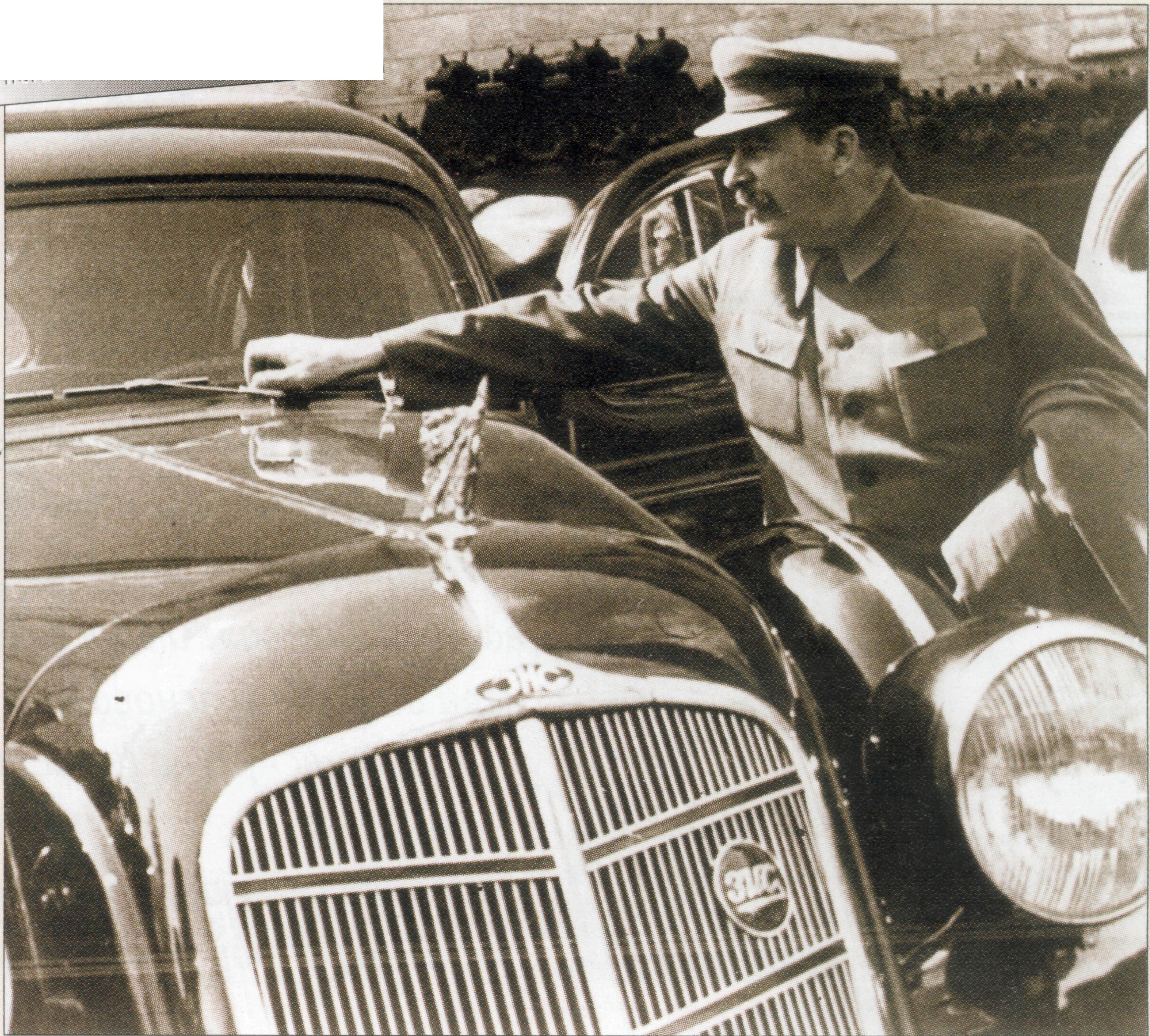 Stalin Сталин поправляет дворник ZIS-101 ЗИС-101